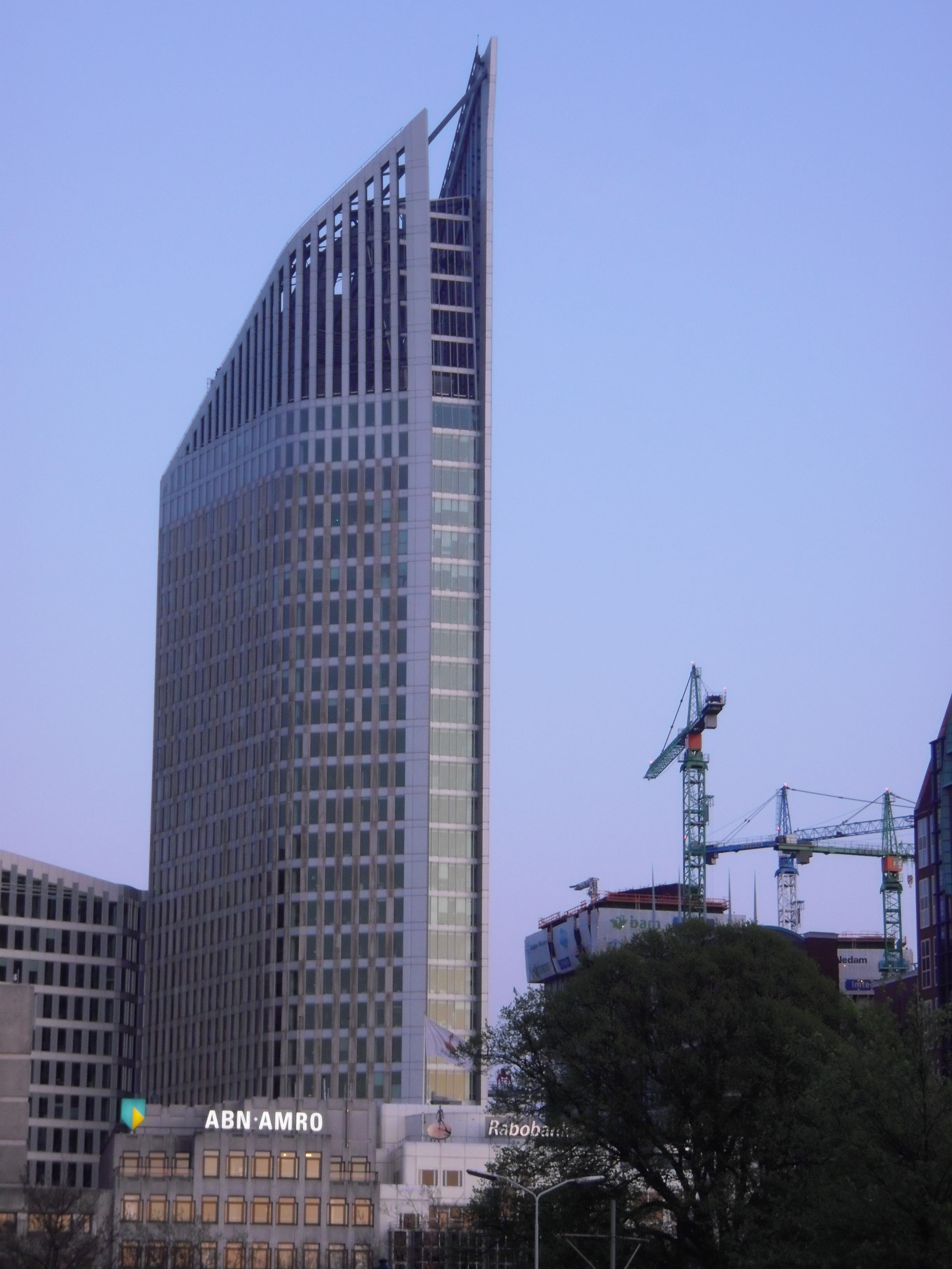 Hoftoren - Den Haag - 2010